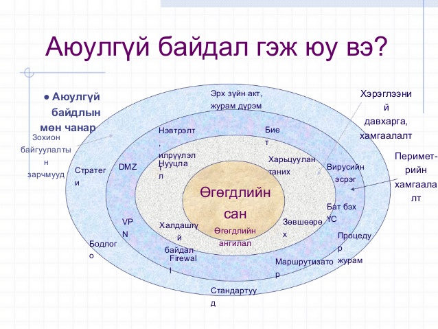 Монгол: Зураг 1. Аюулгүй байдал гэж юу вэ ?